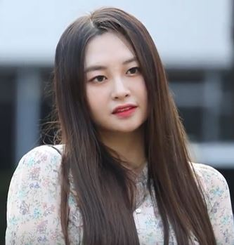 7월 20일 오전 KBS 뮤직뱅크에 모모랜드가 리허설 녹화에 참여하기 위해 출근하고 있다.